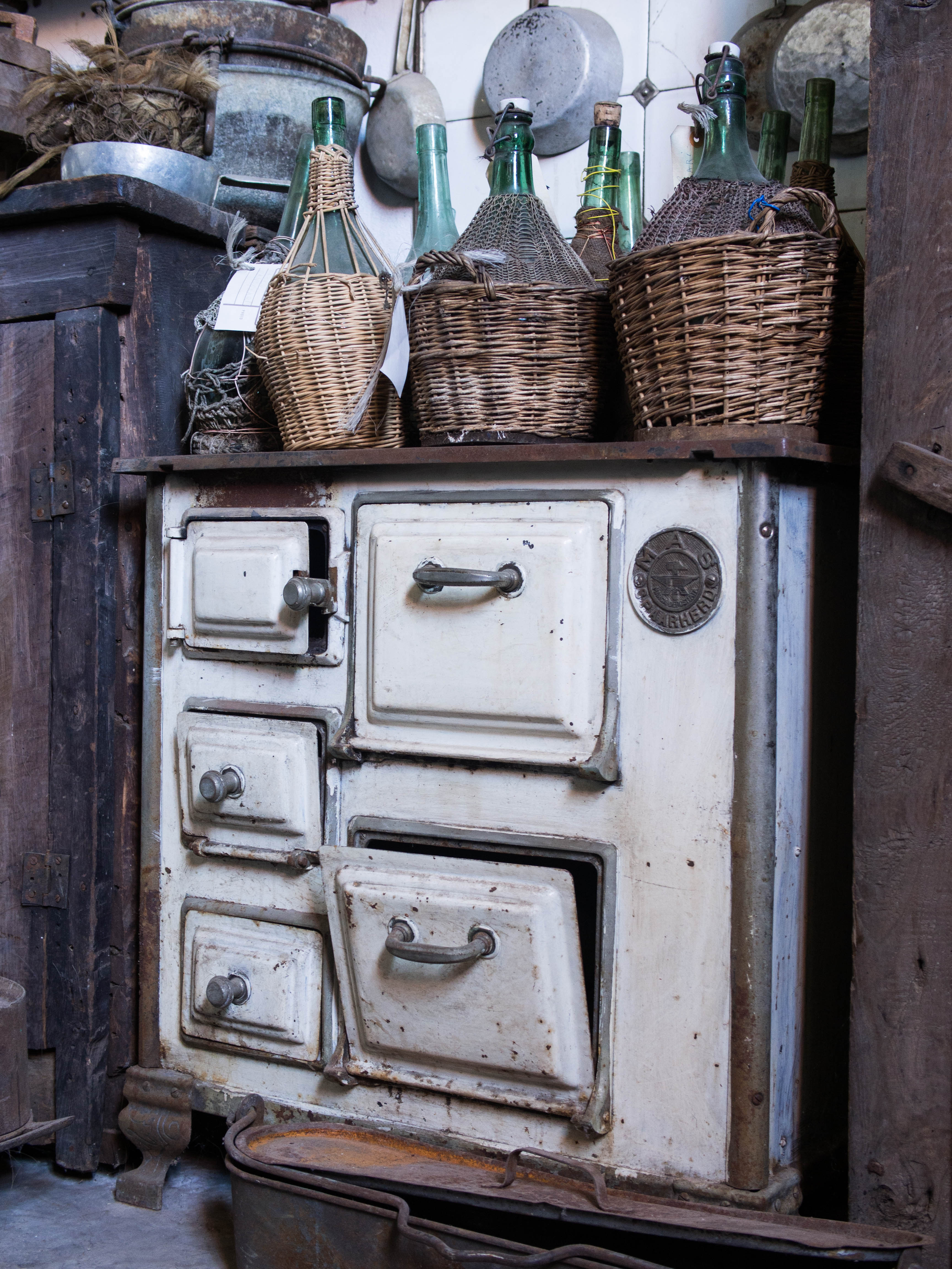 Fornello esposto al museo Ettore Guatelli – Italia.